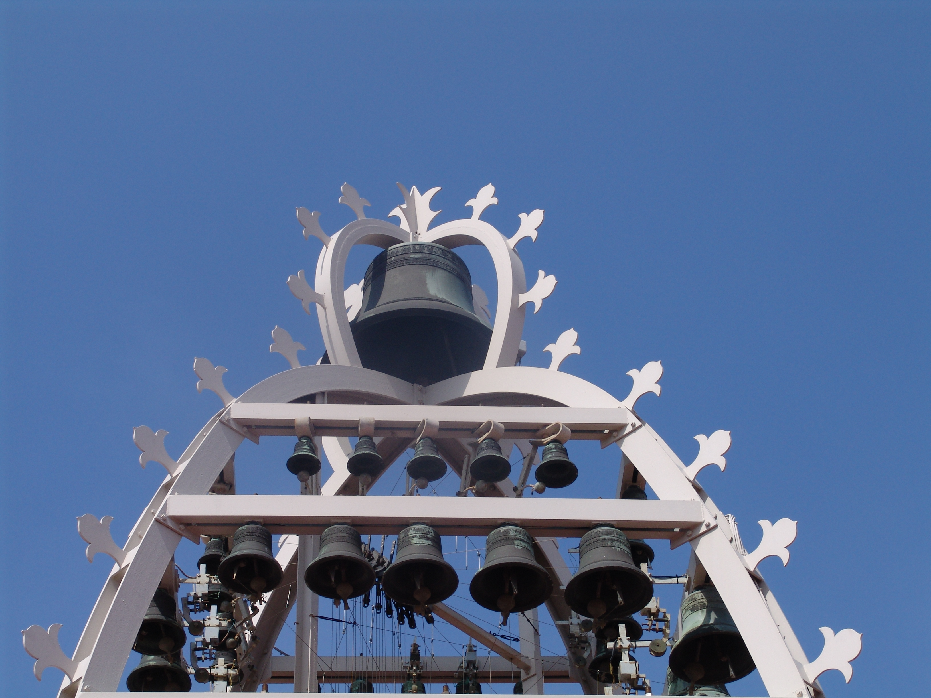 Carilló del Palau de la Generalitat que té 49 campanes i un pes total de 4.898 quilos